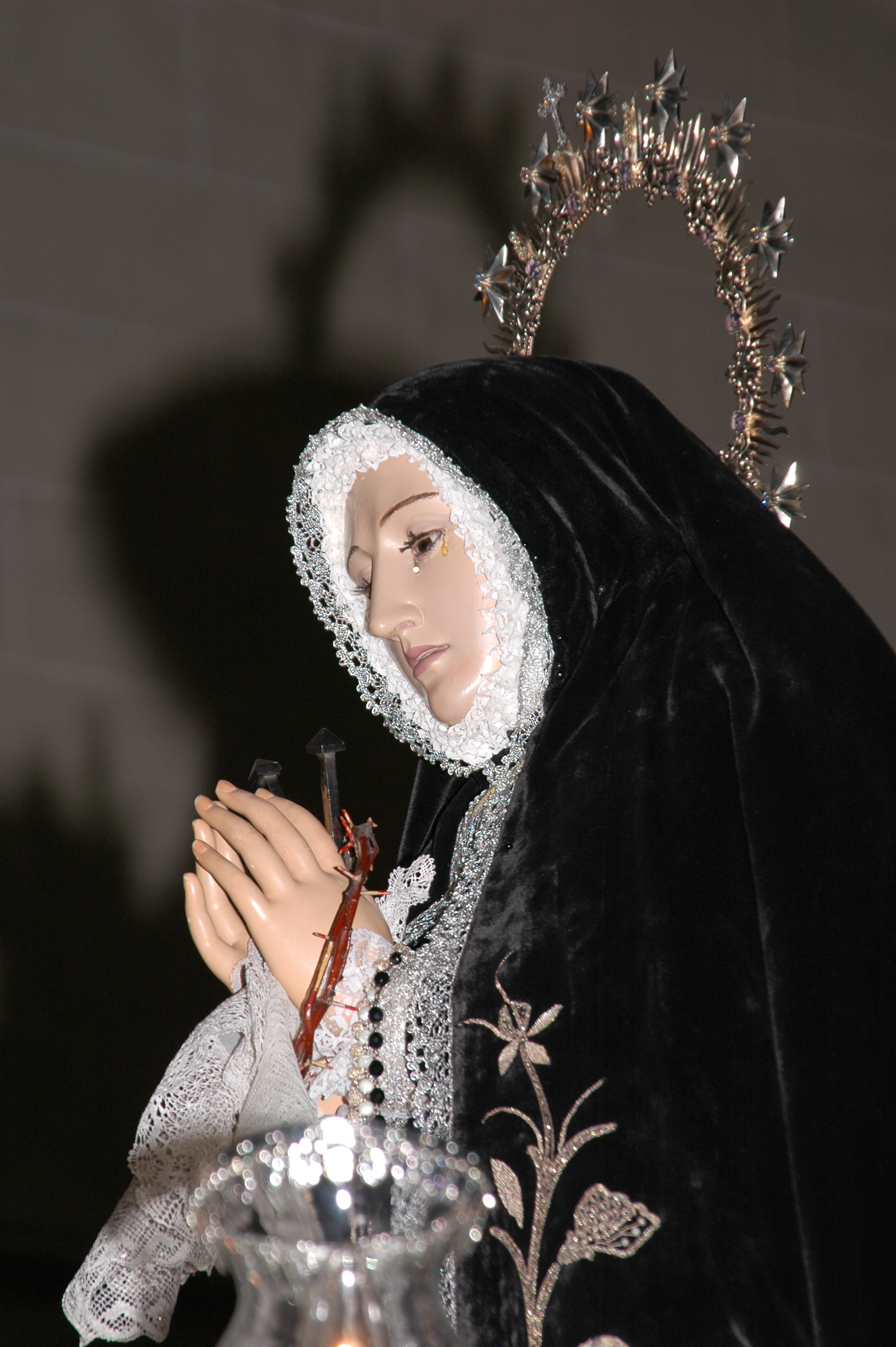 Imagen de Nuestra Señora de la Soledad de Monóvar, Semana Santa 2007